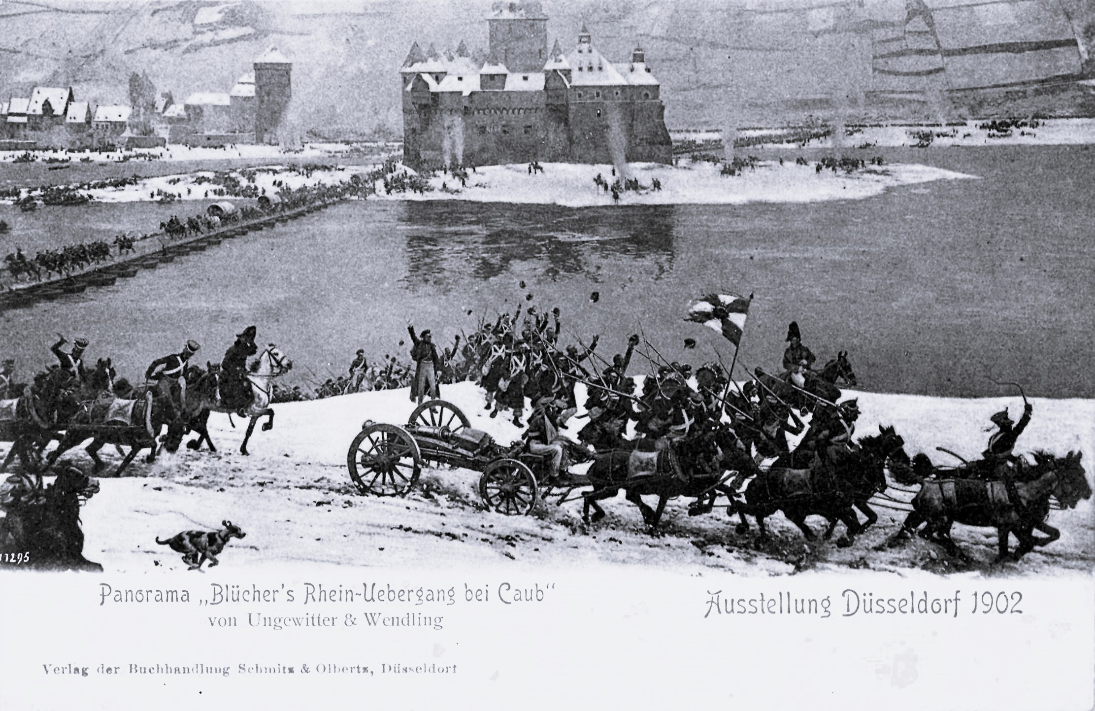 Gewerbe- und Industrie-Ausstellung 1902, Panorama Blücher's Rhein-Uebergang bei Caub